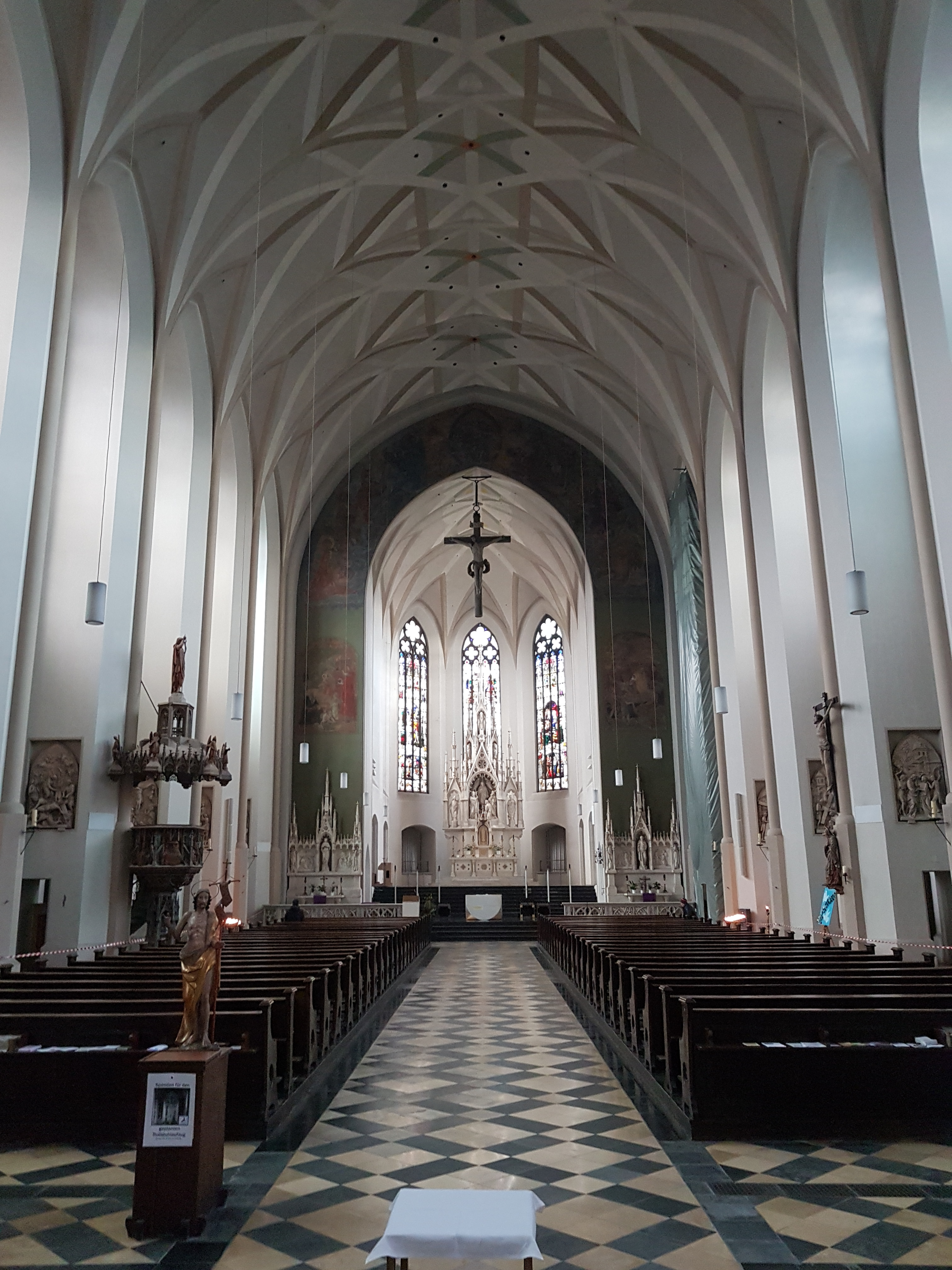 München, Neue Pfarrkirche St. Johann Baptist (Haidhausen), Innenraum mit Blick zum Chor.